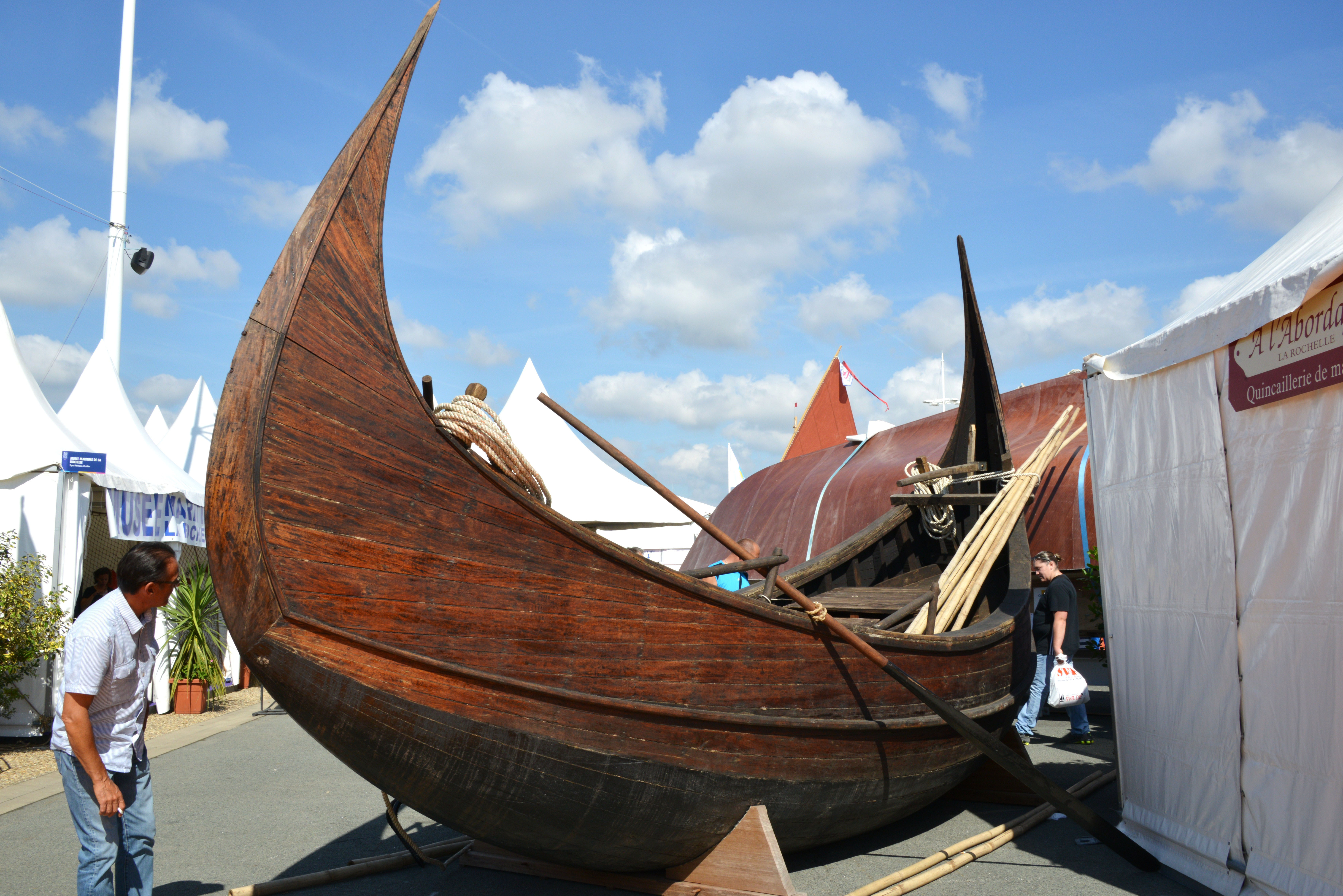 Le bateau-lune de l’Association Watever exposé au Salon Nautique International à Flot de La Rochelle 2015: vue générale du bateau-lune. Ce bateau a été construit et lancé en 2013 au chantier naval TaraTari à Chittagong au Bangladesh à l’initiative de Watever. Le bateau-lune est un bateau de pêche traditionnel propre au district de Cox’s Bazar à l’extrême sud-est du Bangladesh. La Rochelle, Charente-Maritime, France.